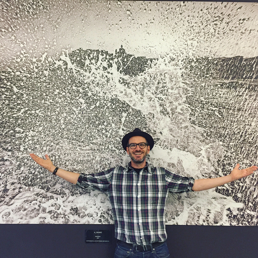 Settimio Benedusi davanti ad una sua opera: A_MARE.